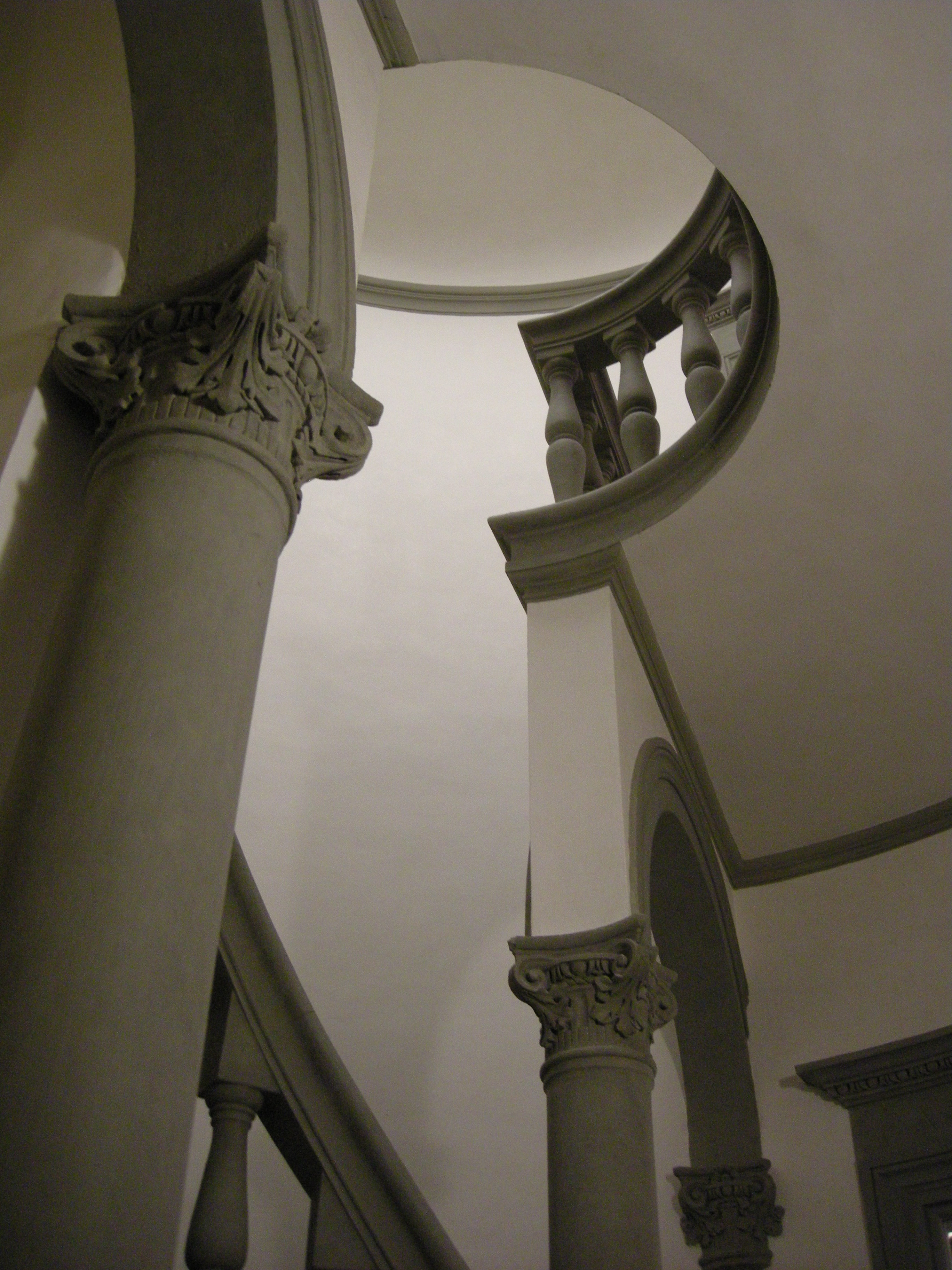 Museo bandini, scalinata